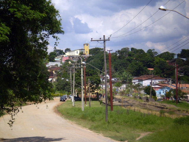 Vista Panoramica - 4